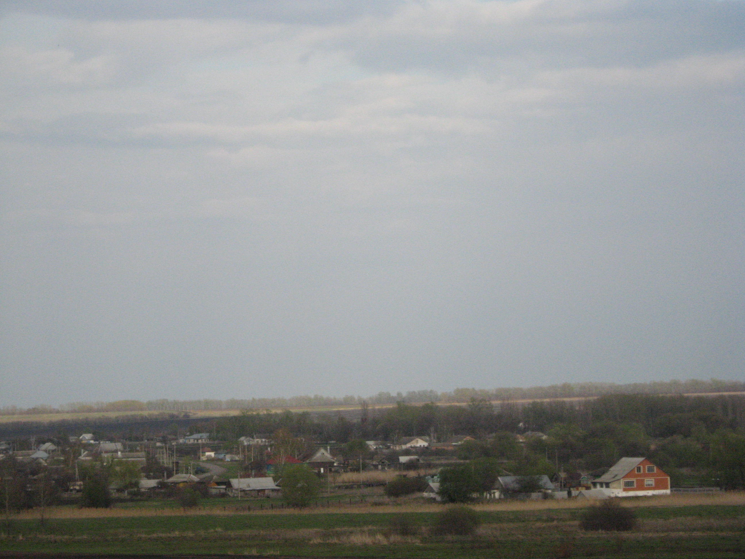 Видно село.